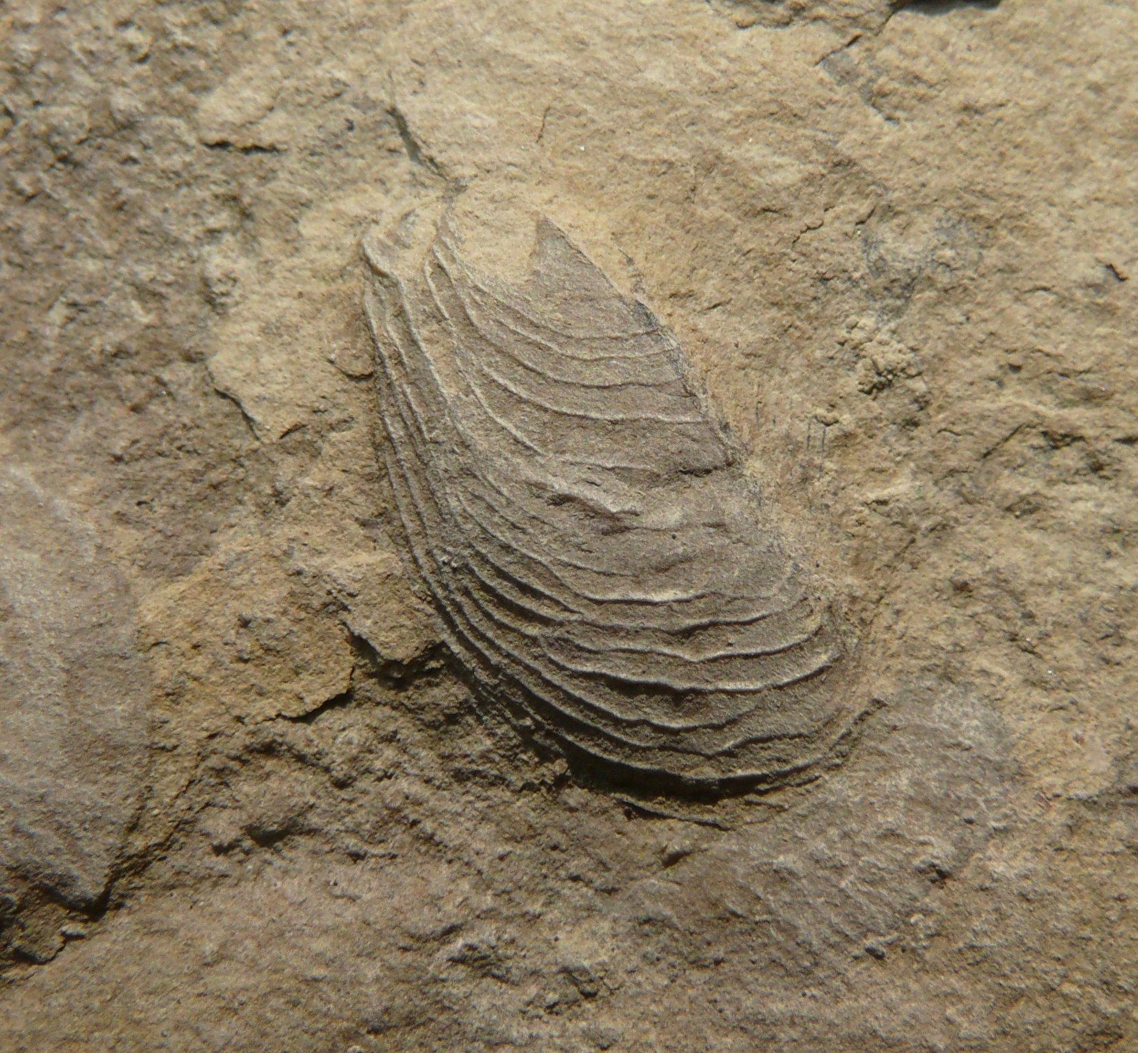 Bakevellia costata, Trochitenkalk-Formation, Oberer Muschelkalk Hohenlohe, Deutschland